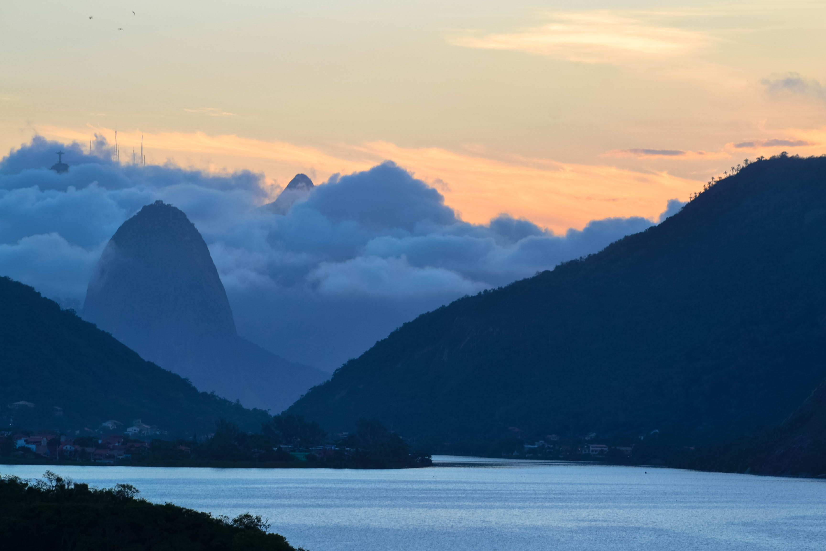 Foto feita do bairro de Camboinhas, Niterói, aproveitando a bela luz de um entardecer de outono. Nikon D3100, lente 55-300.